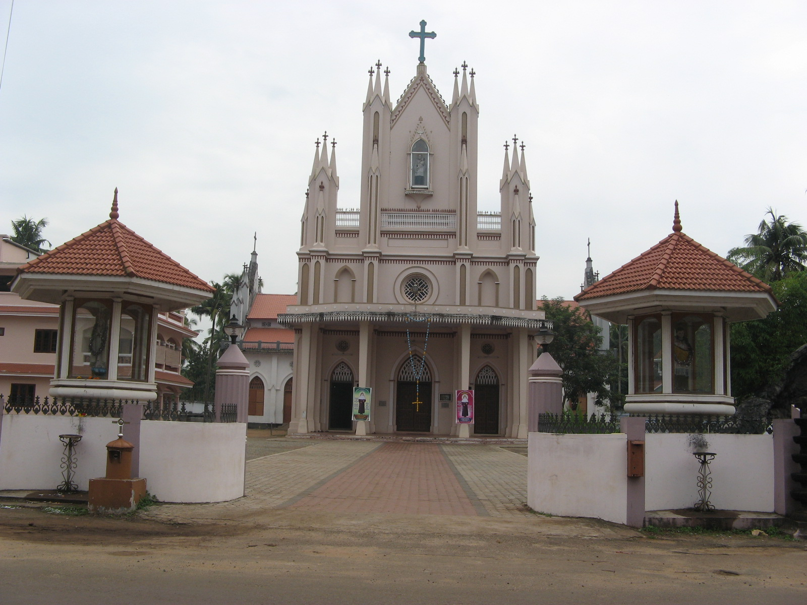 മാള ഫെറോന പള്ളി